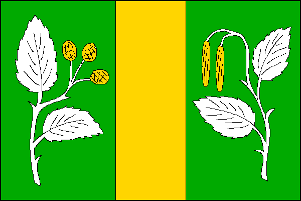 vlajka, Olšovec ,okres Přerov